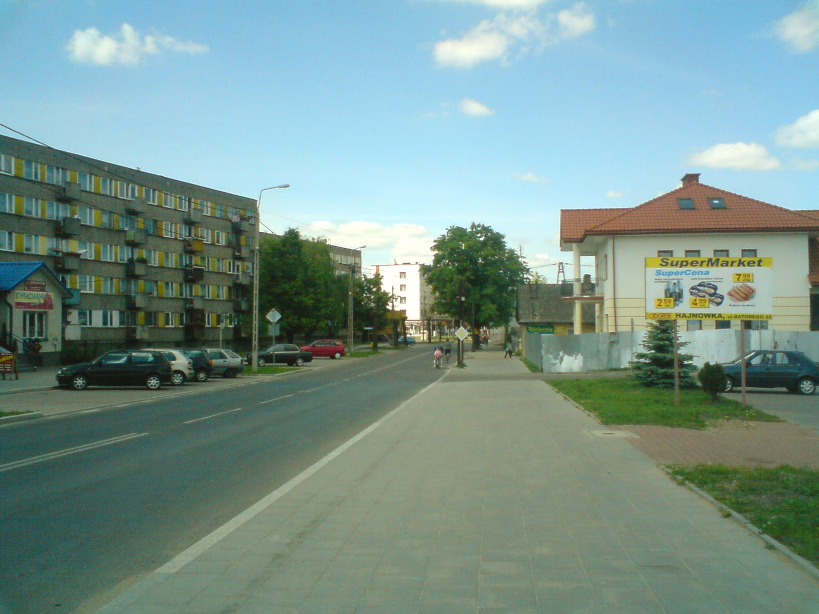 Ulica St.Btorego - Hajnówka